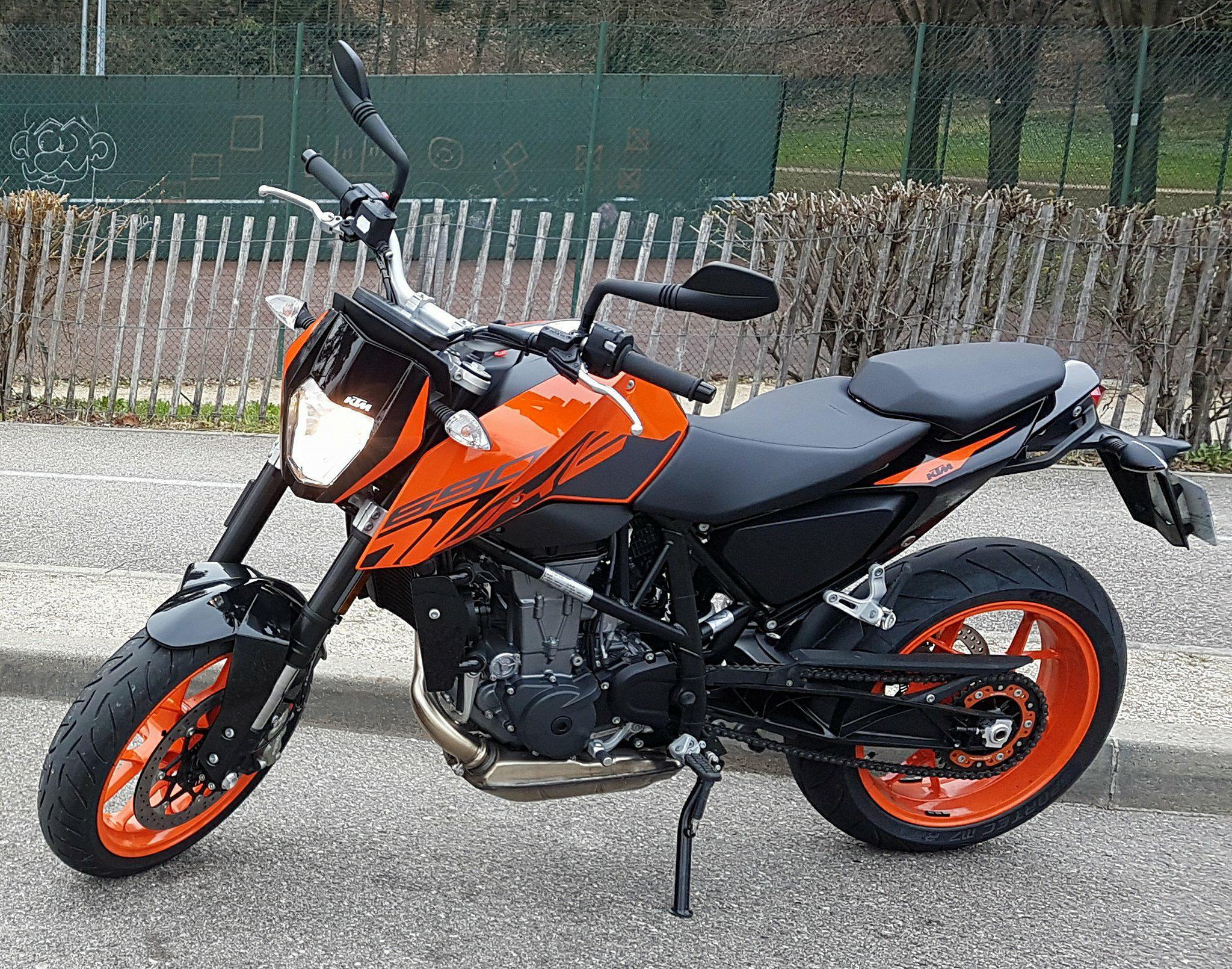 Photo d'une KTM Duke 690 de 2018